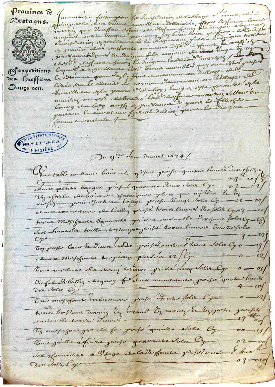 Description : inventaire sur papier timbré en date du 9 avril 1674 établi par la juridiction de l'abbaye Sainte-Croix de Quimperlé après le décès d'un résident de Baye, produit avant la révolte du Papier timbré. Document conservé aux Archives départementales du Finistère. Place : Baye, Bretagne, France Date : 9 avril 1674 Auteur : Pline